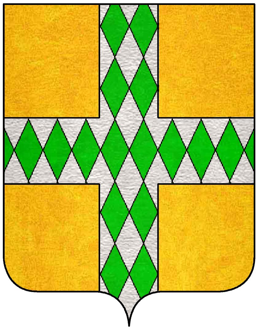 Stemma della famiglia Ardinghelli